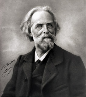 Élisée Reclus, né à Sainte-Foy-la-Grande (Gironde) le 15 mars 1830 et mort à Torhout en Belgique le 4 juillet 1905, est un géographe libertaire.